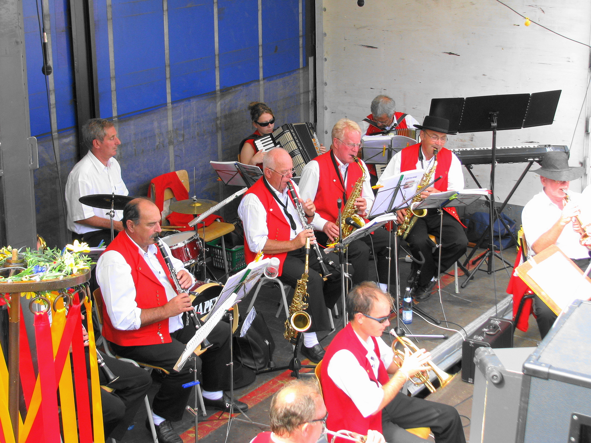 Bloosmusik from Alsace